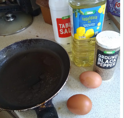 la fritota ovo